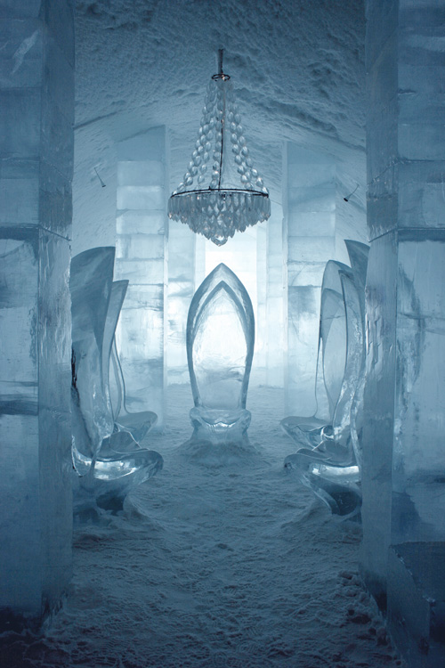 Main hall in ICEHOTEL Jukkasjärvi, Sweden, 2007. Sculptures by Jörgen Westin.